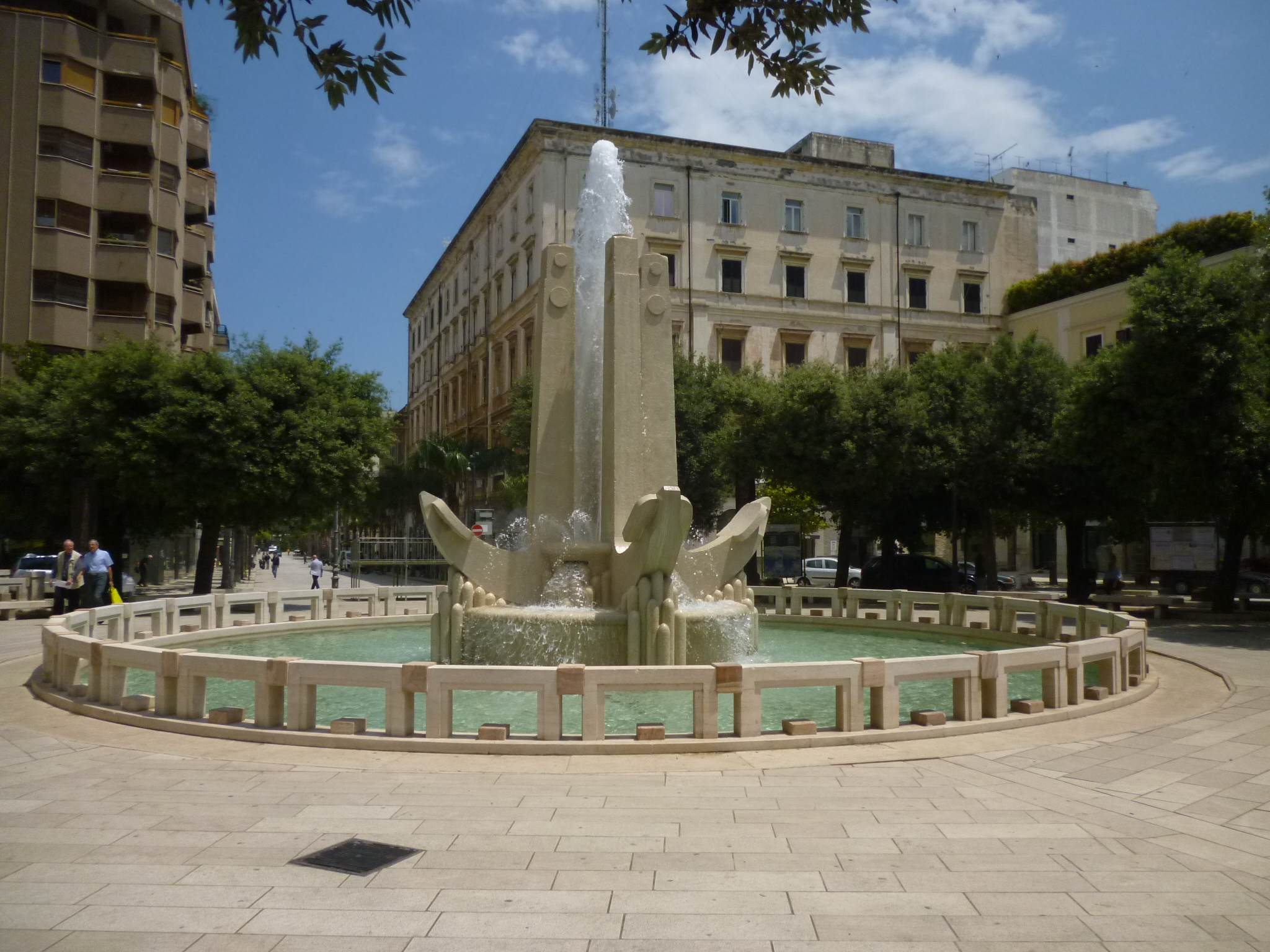 מראות העיר ברידיזי 2013